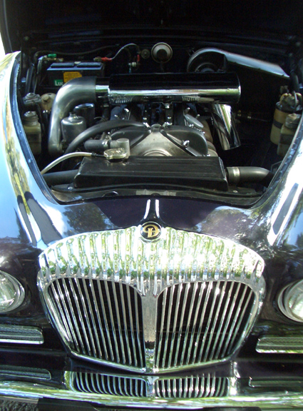 1967 Daimler Sovereign engine bay